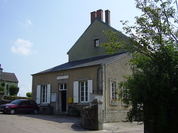 Mairie de la commune de Gâcogne (Nièvre)